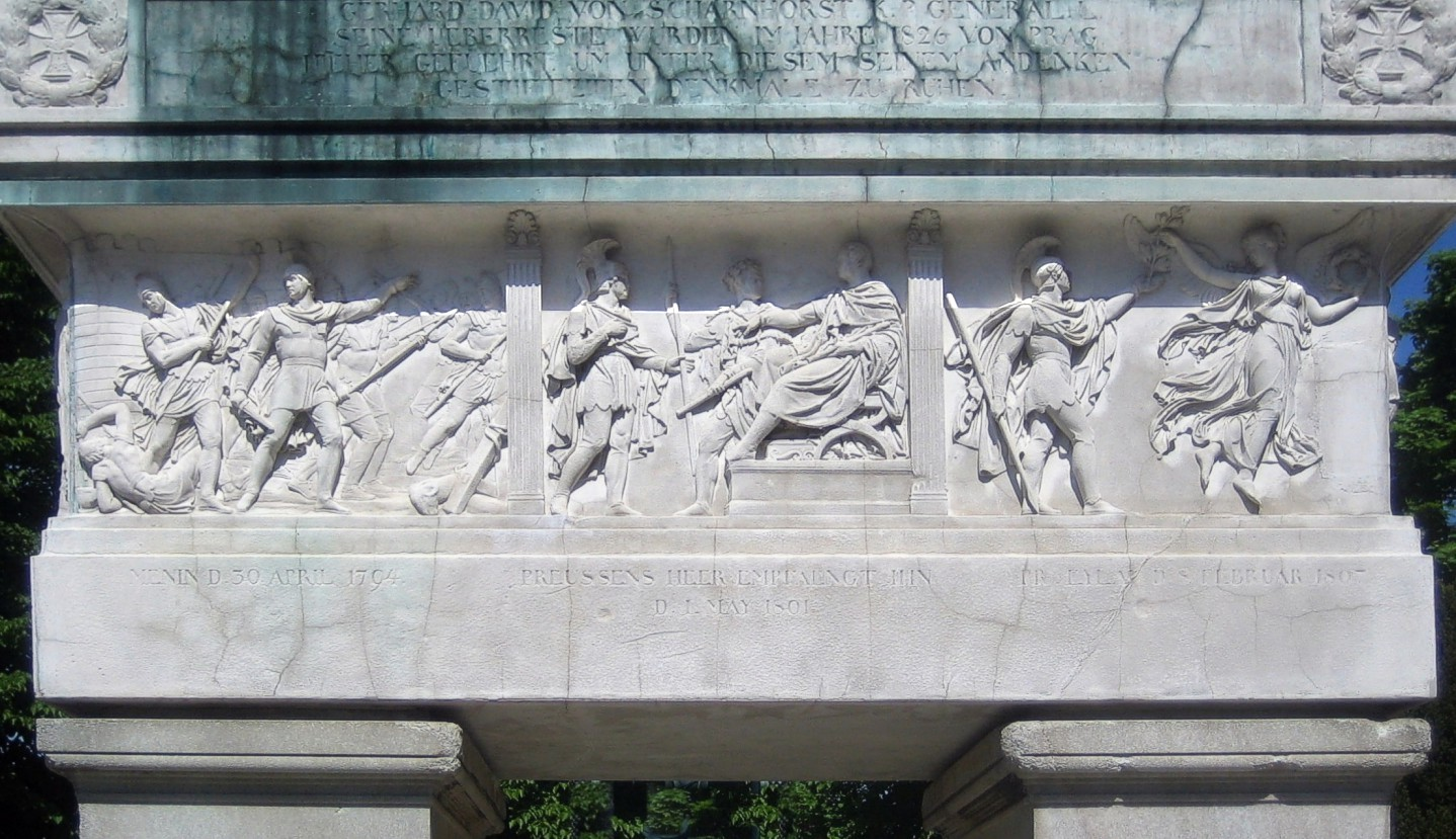 Relief at the tomb of general Gerhard von Scharnhorst (1755-1813) in Berlin. Sculptor: Christian Friedrich Tieck.